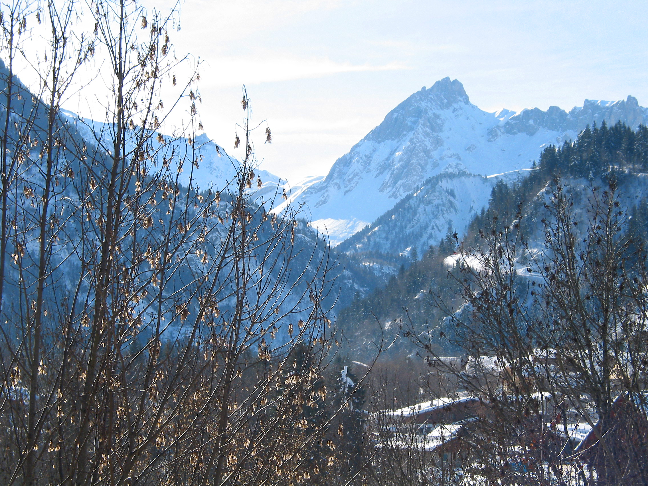 Les Contamines-Montjoie (Haute-Savoie - France).